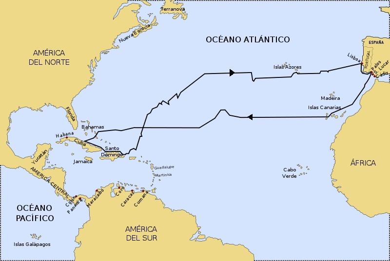 Este fue el primer viaje del almirante